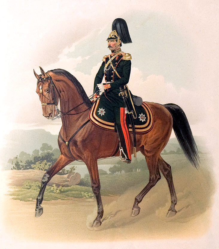 Штаб-офицер Гвардейской Конной Артиллерии (В парадной форме.) 15 марта 1855.